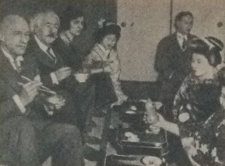 1923年の訪日時のウィリー・ブルメスター（左端）とヨーゼフ・ホルマン (Joseph Hollman・左から2番目)